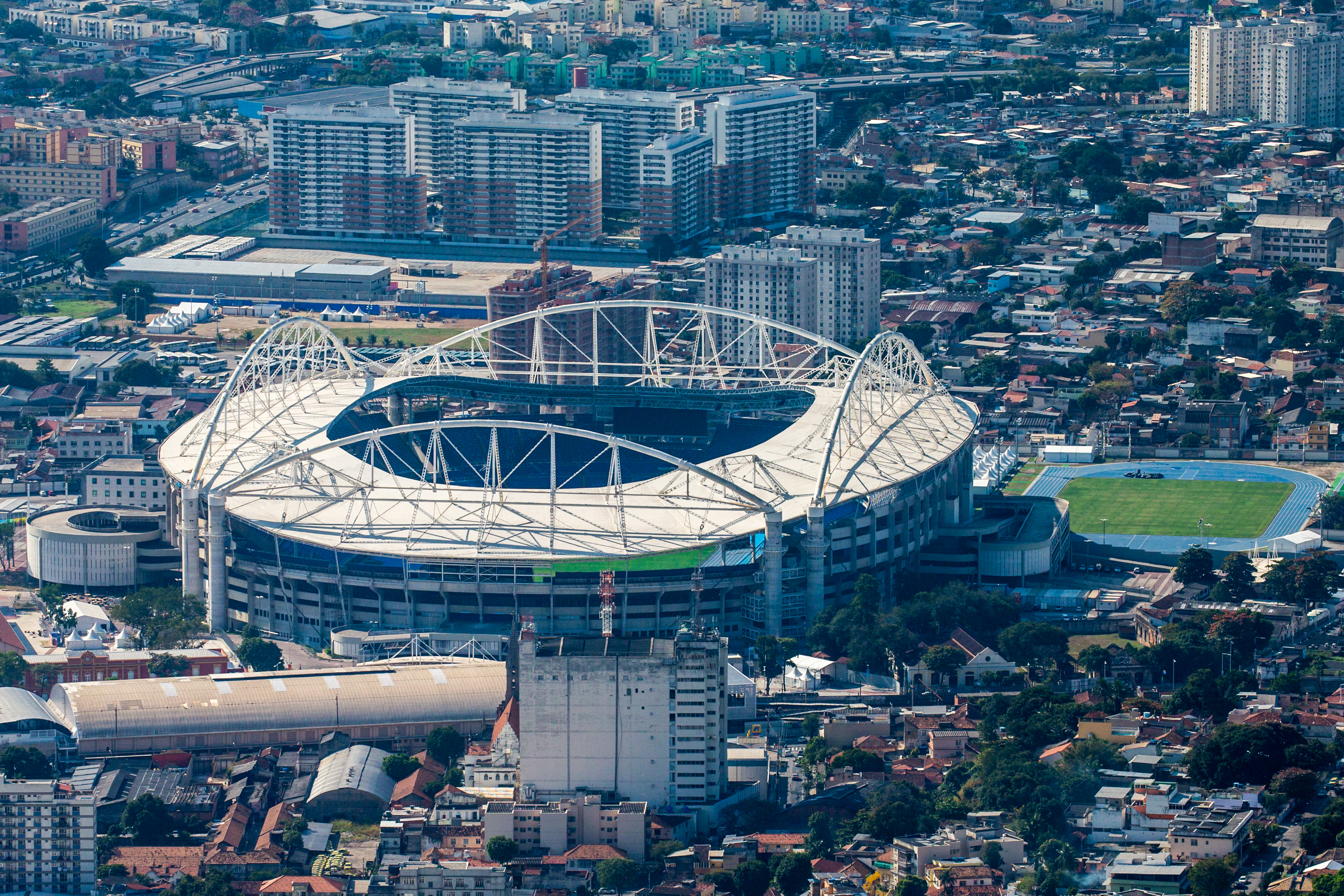 Estádio Olímpico Engenhão, palco do atletismo nos Jogos Olímpicos.